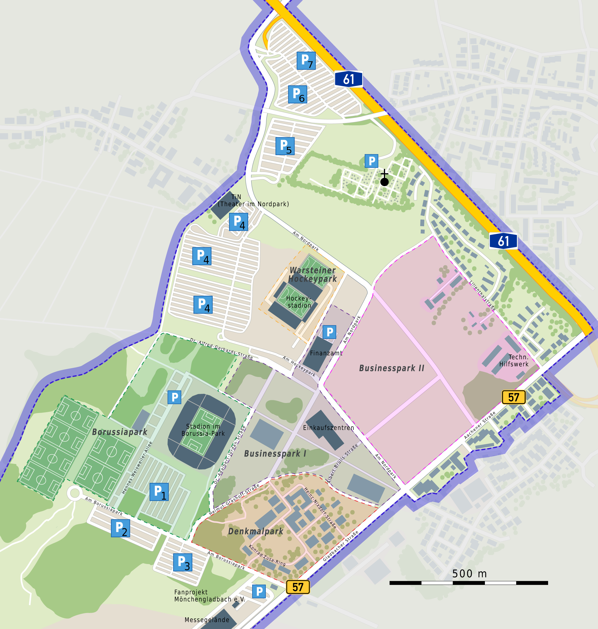 Lageplan Nordpark Mönchengladbach (Teilausschnitt)